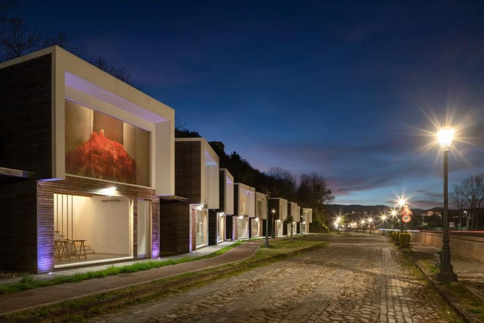 Scorcio notturno dei box art nel centro storico di Cosenza